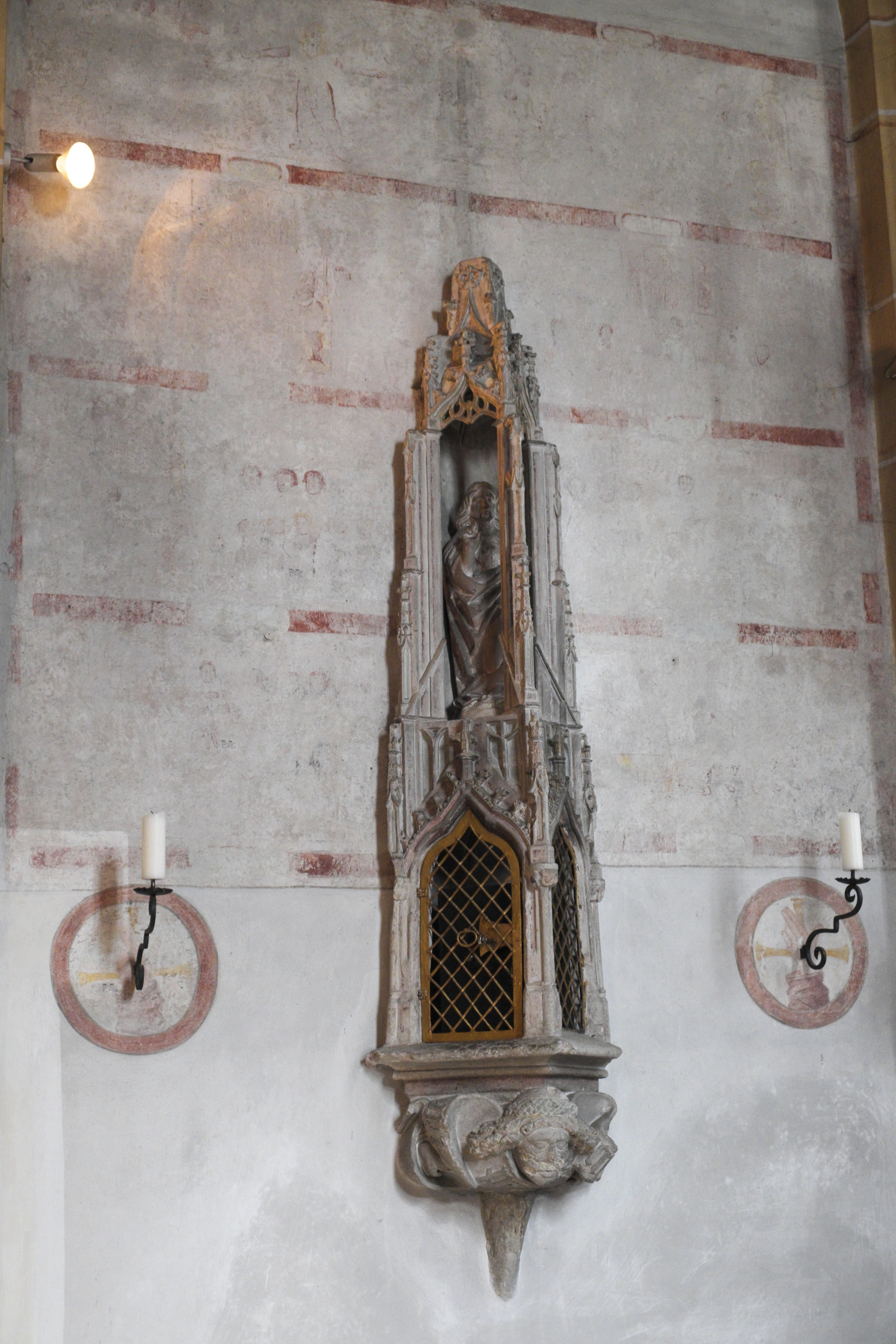 Katholische Pfarrkirche St. Martin in Untermenzing im Stadtbezirk Allach-Untermenzing in München (Bayern/Deutschland), spätgotisches Sakramentshäuschen